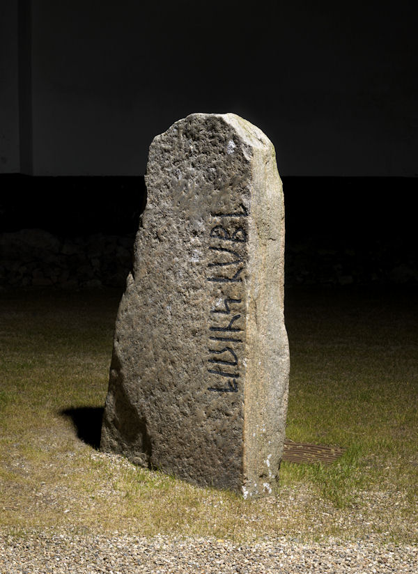 Foto: Nationalmuseet ved Roberto Fortuna